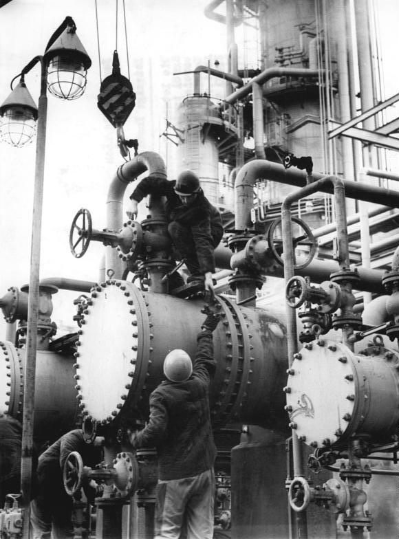 Zentralbild-Koch 28.12.1967 Bez. Leipzig: Kombinat Böhlen nimmt Erdölverarbeitung auf. Die letzten Vorbereitungen für die Verarbeitung von Erdöl treffen gegenwärtig die Werktätigen des Chemiebereiches sowie der Bau- und Montageabteilungen im Kombinat Otto Grotewohl in Böhlen. Ab 1.1.1968 werden im Werk erstmalig aus sowjetischem Erdöl Treibstoff und Heizöl hergestellt werden. Bisher wurden in Böhlen Treibstoffe und Heizöl ausschließlich durch Kohleveredlung gewonnen.